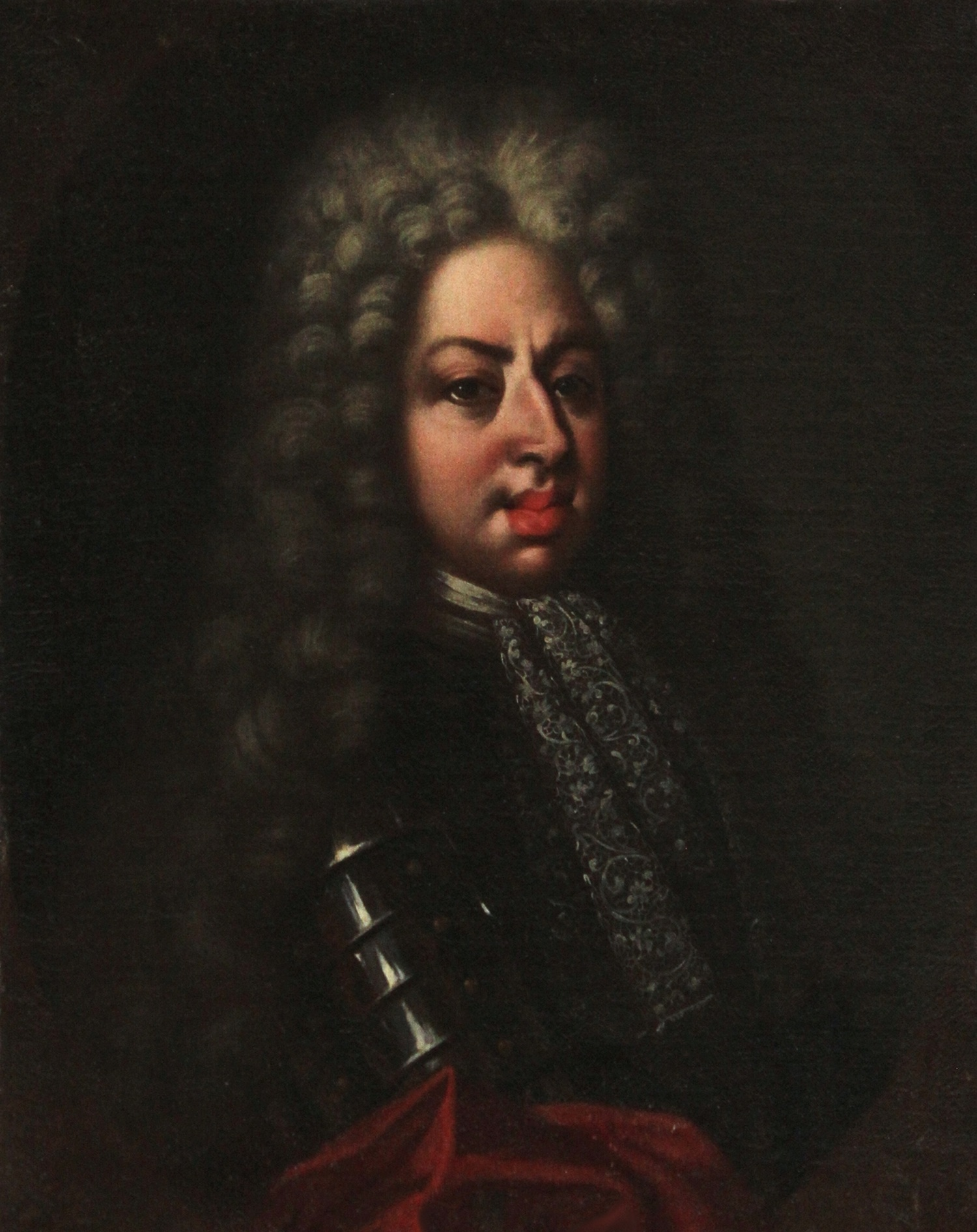 La sovrapposizione cranio-facciale del teschio di Gian Gastone de' Medici, di cui è stato realizzato un calco durante la riesumazione della salma nel 2004, con questo ritratto ha denotato una notevole sovrapponibilità del mento e della mandibola e una corrispondenza «impressionante [...] nella regione nasale». Si tratta dunque di un ritratto particolarmente realistico e attento a riprodurre le reali fattezze di Gian Gastone (Franco Ugo Rollo, Il vero volto di Gian Gastone, in Monica Bietti (a cura di), Gian Gastone (1671-1737). Testimonianze e scoperte sull'ultimo Granduca de' Medici, Firenze, Giunti, 2008, pp. 231-238.